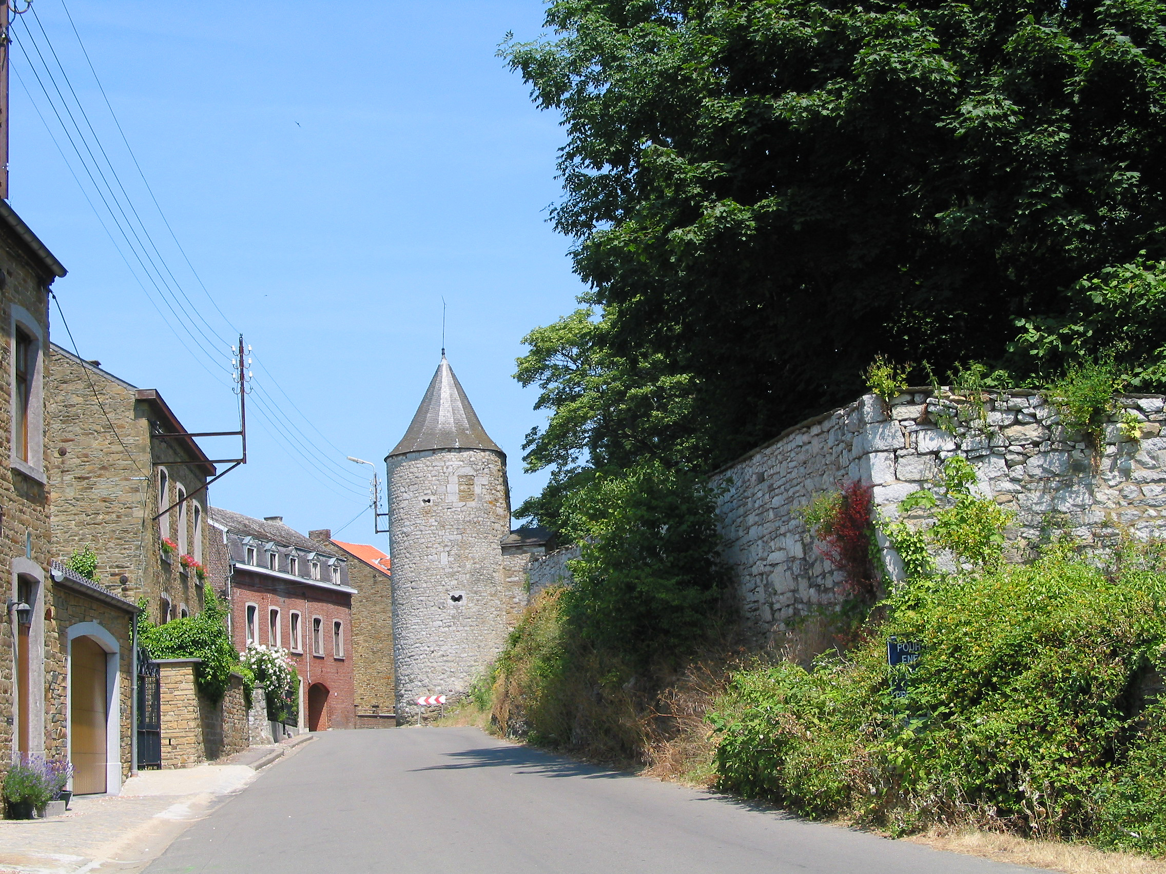 Villers-le-Temple (Belgique), tour et mur d'enceinte de l'ancienne commanderie de l'ordre du Temple.